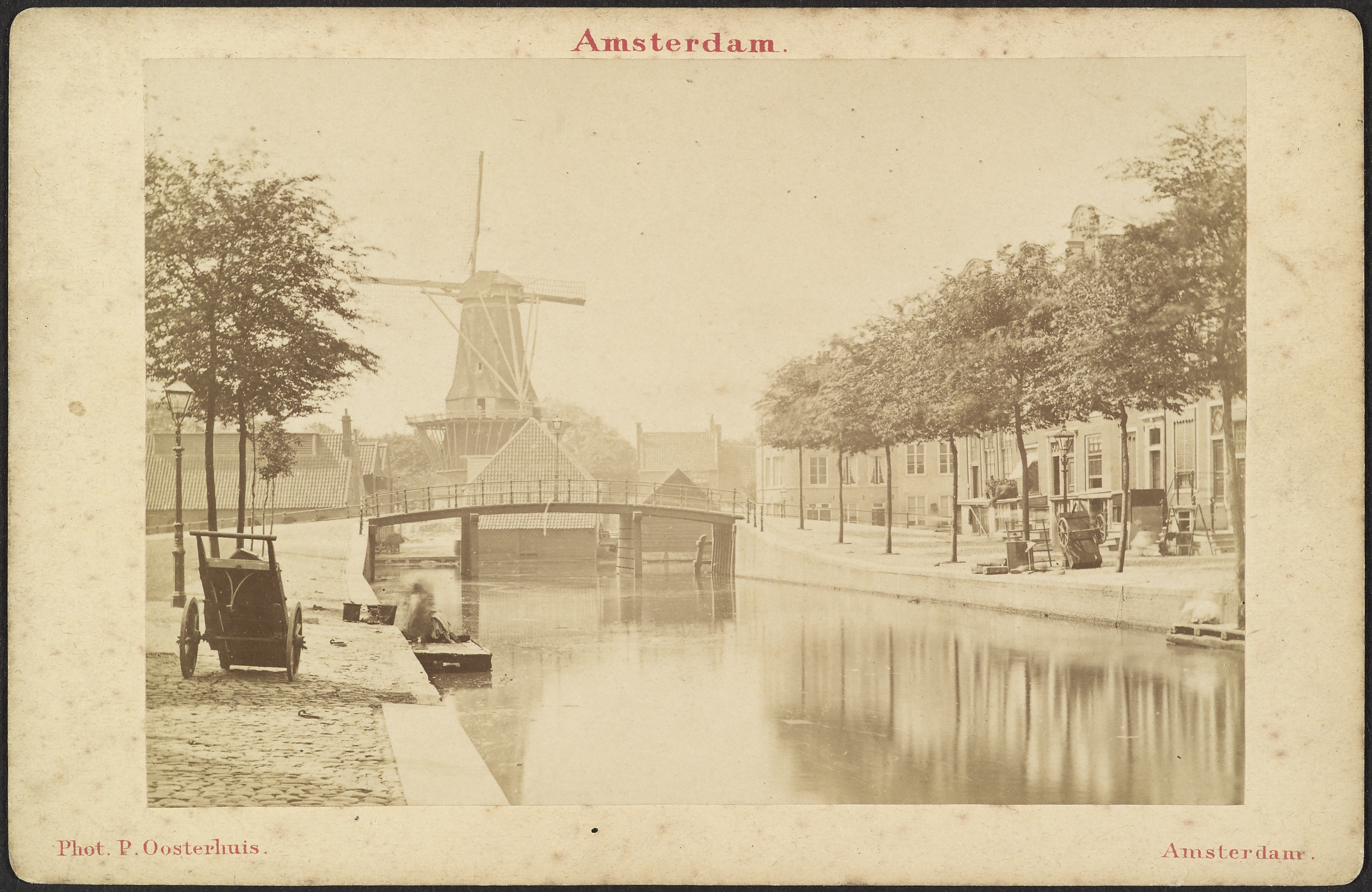 De Spiering: Amsterdam, gezien richting de Lijnbaansgracht met brug (brug 88) en molen op de achtergrond (opmerking: Kabinetfoto)